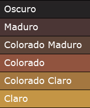 цветове на пури, производна на руската